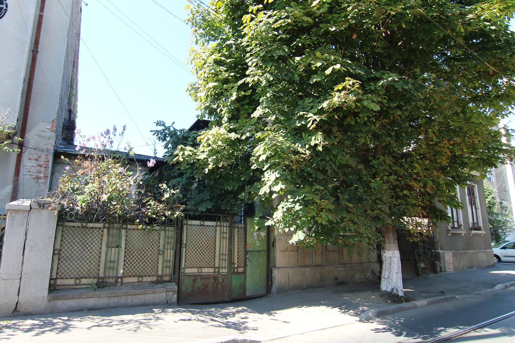 Casă pe strada Traian